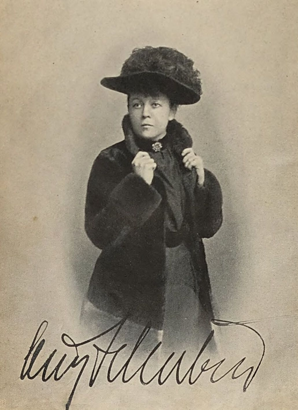 picture of Ossip Schubin (17. Juni 1854, Prag – 10. Februar 1934, auf Schloß Kosatek)